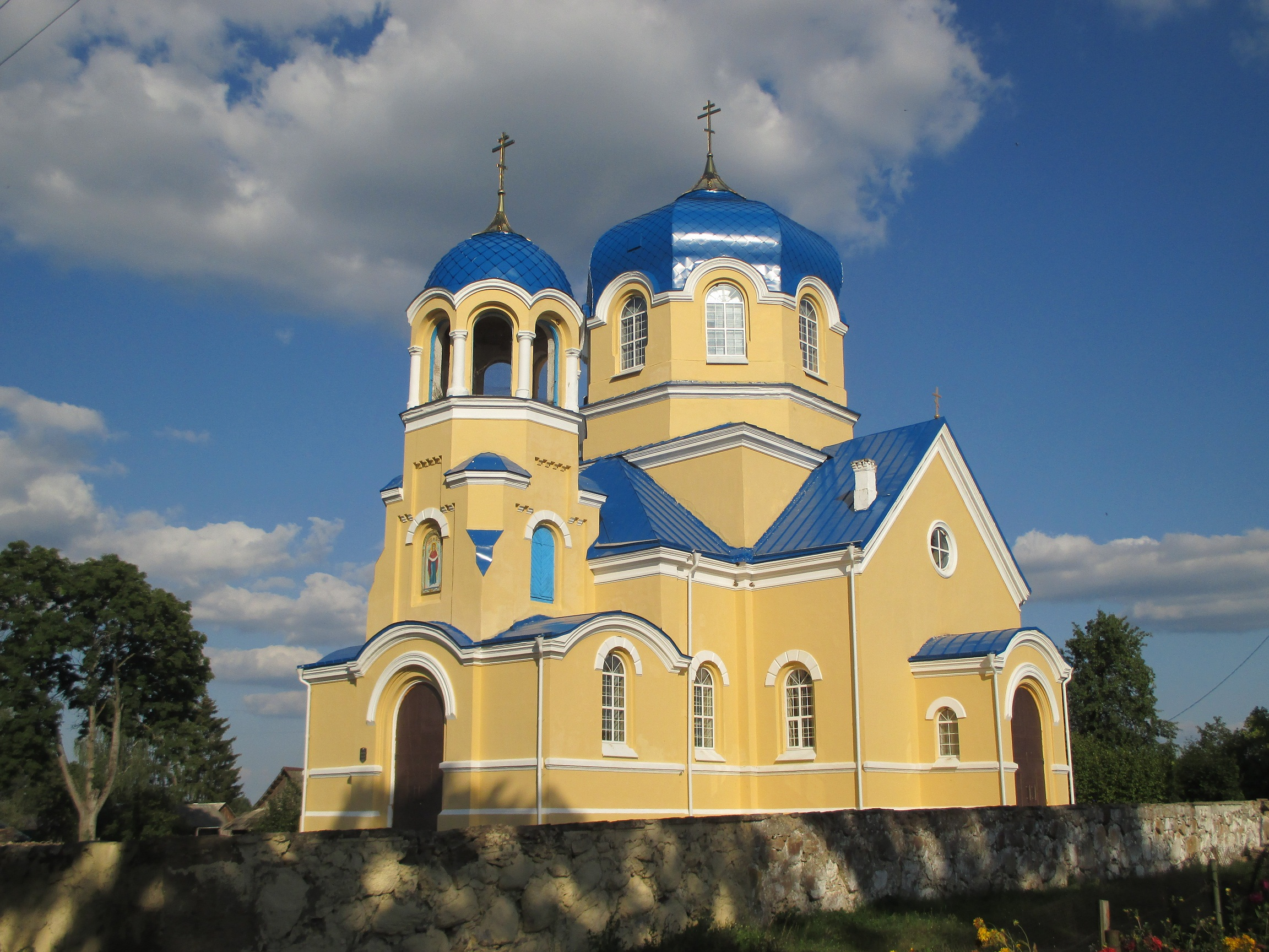 Свята-Пакроўская царква, Збляны, Лідскі раён, Беларусь